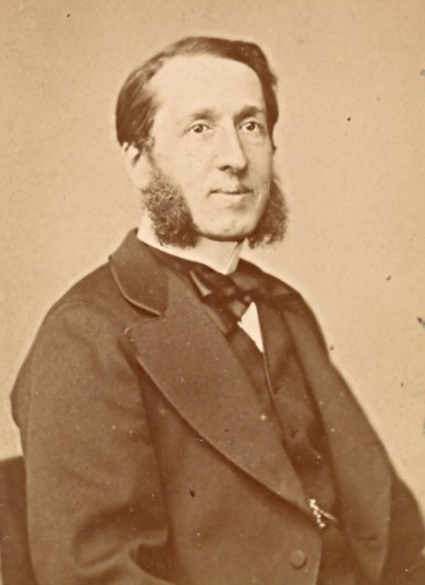 A. Lefèvre-Pontalis